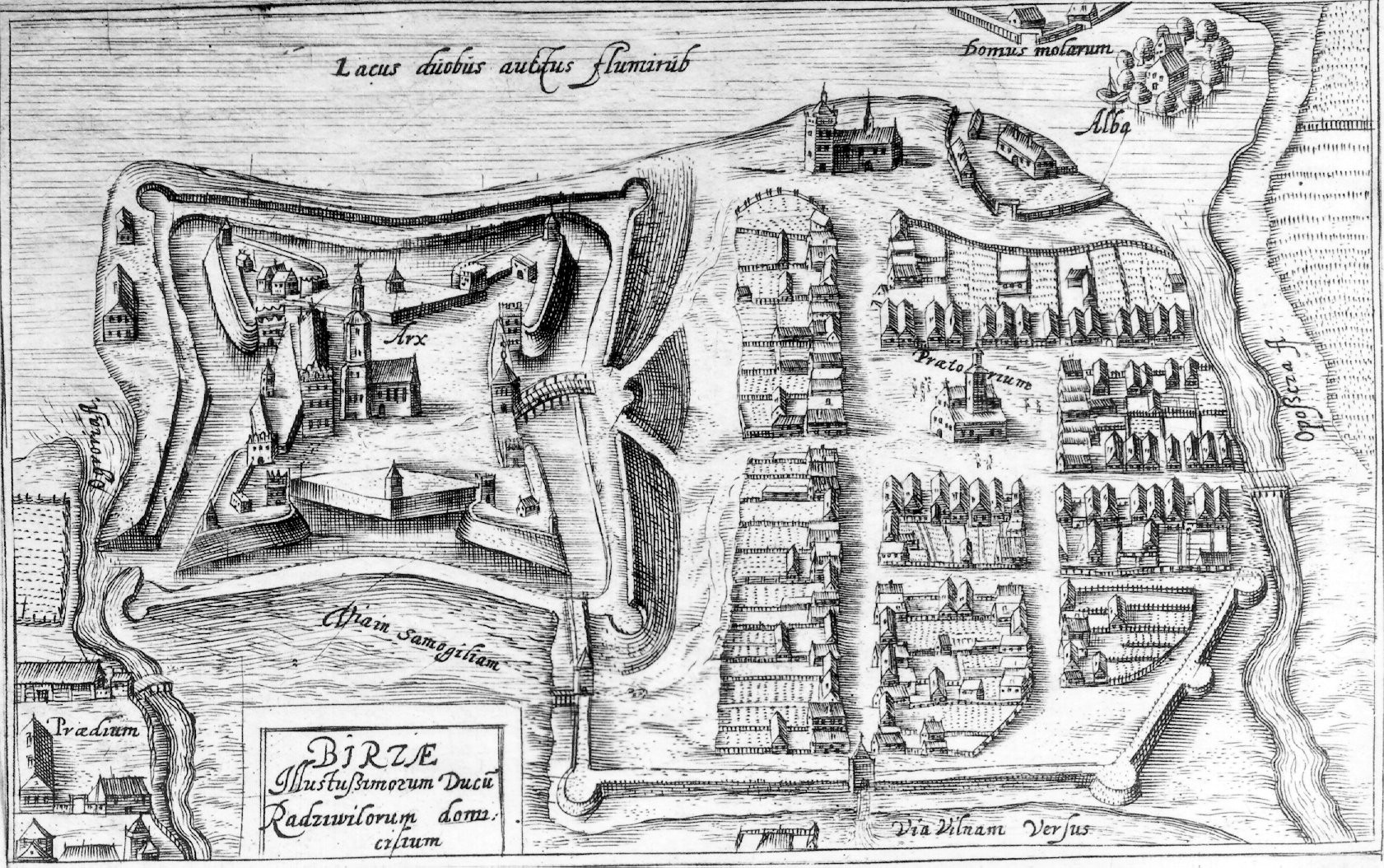 Biržų miesto planas XVII a. pradžioje